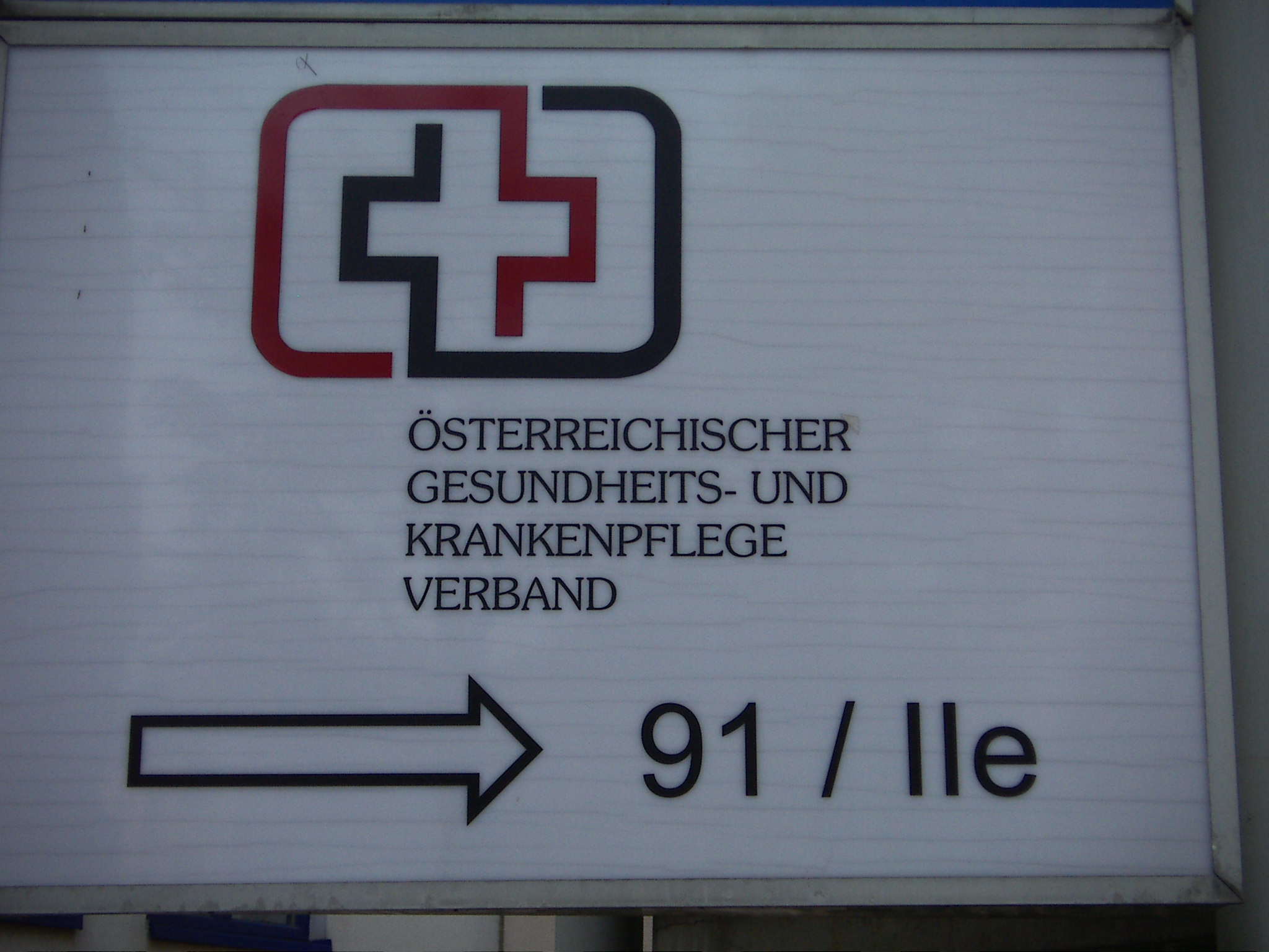 Österreichischer Gesundheits- und Krankenpflegeverband, Hinweis zum Büro des Verbandes in der Wilhelminenstraße 91 in Wien-Ottakring.